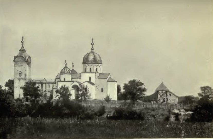 Monasterio de Žiča, donde os reyes mediavales de Serbia eran coronados y fue ungido Alejandro I en 1889.